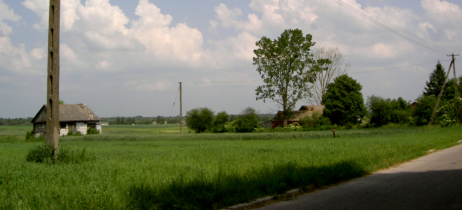 Zosin (powiat hrubieszowski), Poland • Wieś / Village